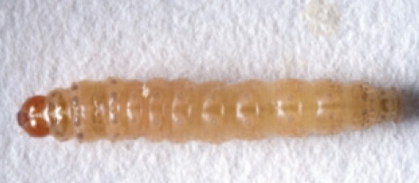 Leucinodes africensis